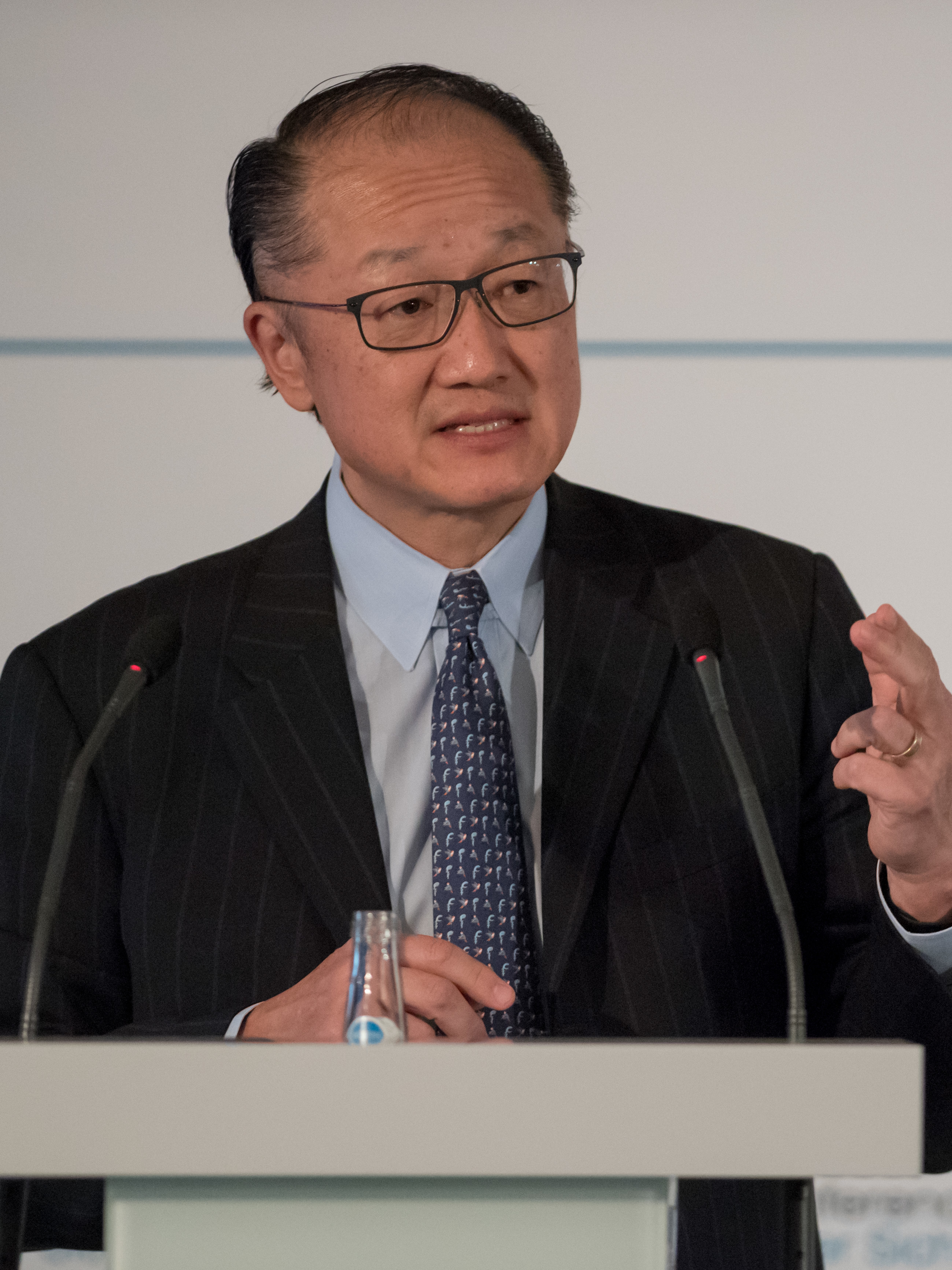 Jim Yong Kim während der Münchener Sicherheitskonferenz 2018